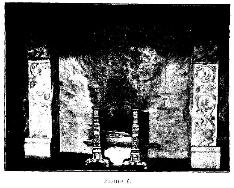 Le Donjon de Courmenant, ses origines, ses seigneurs et possesseurs, son musée